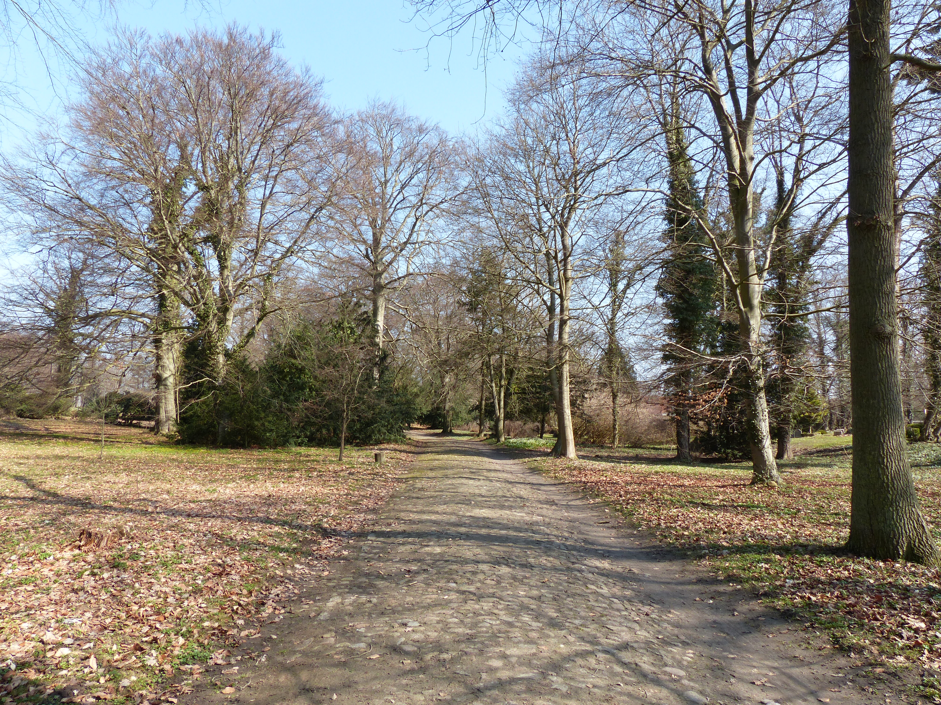 Landschaftspark Behrenhoff, Hauptweg nördlich des Bärentors